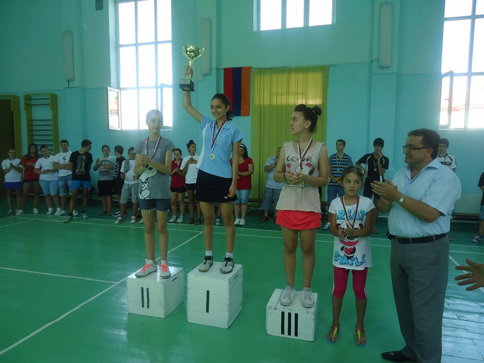 2012 թ. Պերվոմայ, Բուլղարիա